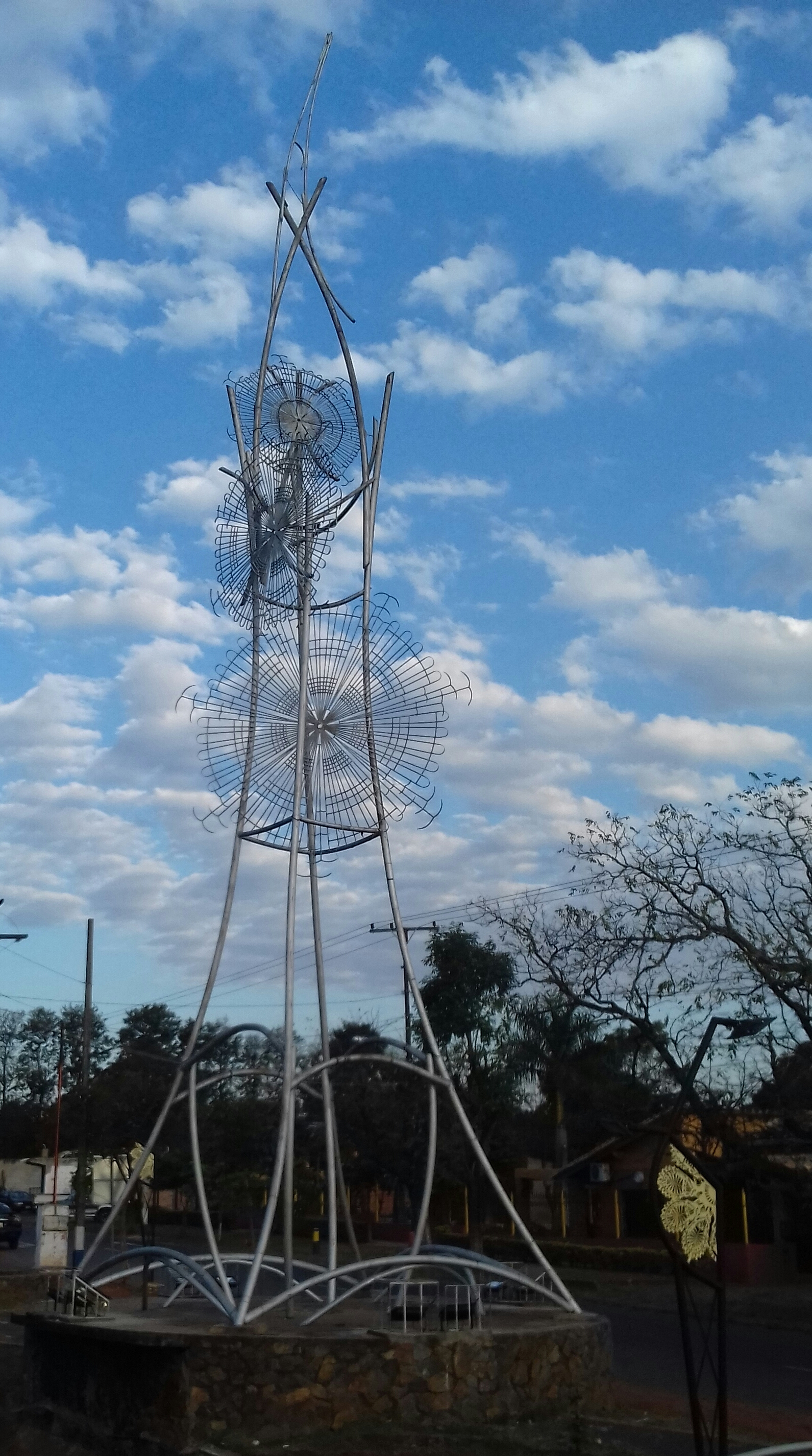 Este monumento fue hecho de metal y su altura es de 18 metros. Representa a un árbol en cuyo ramaje se extienden los «ojos» dechados de este encaje. Situado al inicio del área urbana, en torno a intersección del antiguo Tapé Tujá (Tte. Esteban Martínez) y la moderna Ruta 2, cuenta con una plazoleta circundante.